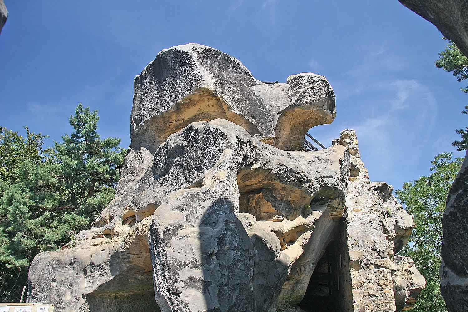 Skalní hrad Rotštejn, Bohemian Paradies, Klokočské skály, Czech Republic Autor:Prazak Date: 20. 7. 2006